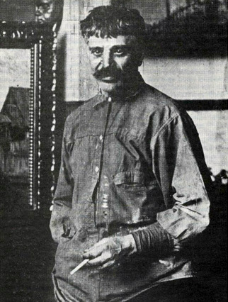 Fotografie de epocă a lui Simon Hollósy